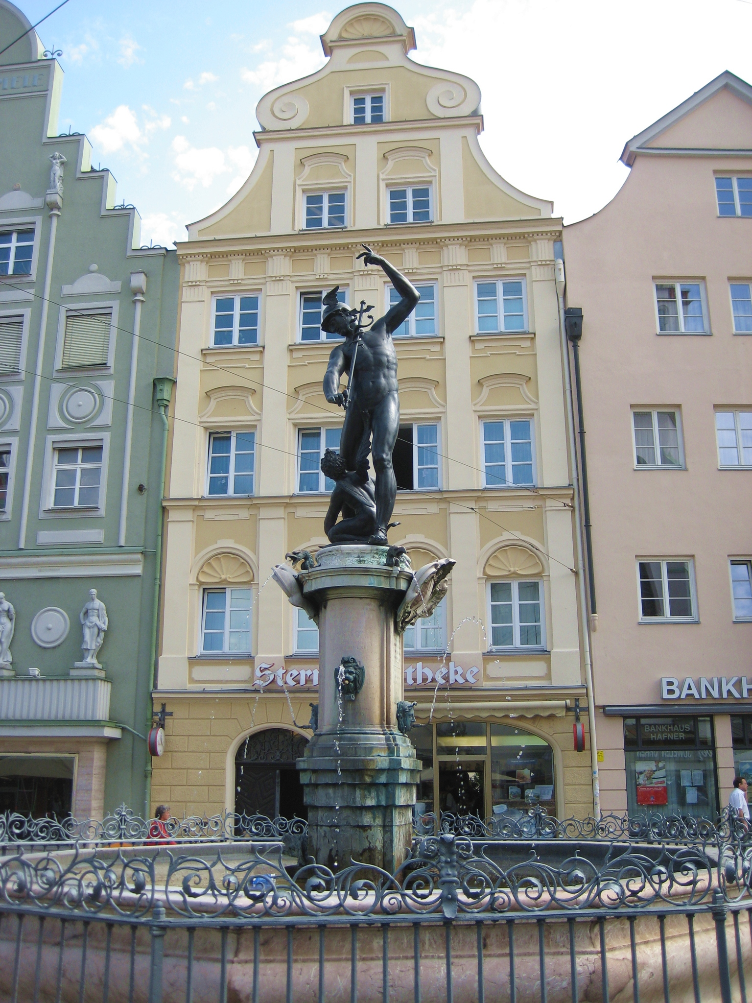 Der Augsburger Merkurbrunnen auf dem Moritzplatz